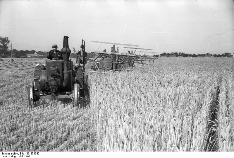 Markee, Traktor bei Feldarbeit Illus-Heilig 27.7.48 Landesgut Markee bei Nauen. U.B.z.: Mit 3 Traktoren gezogenen Bindern wird der letzte Weizenschlag gemäht. 1845-48